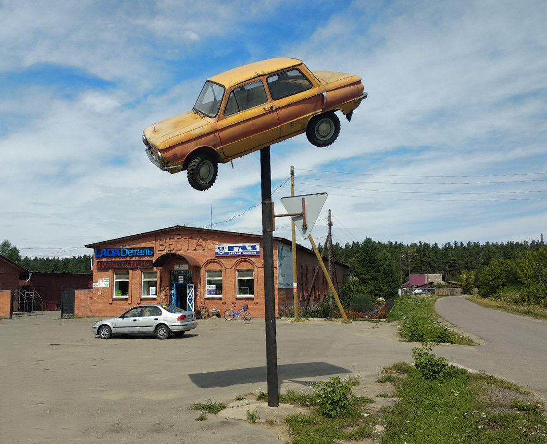 Село Ермаковское, монумент